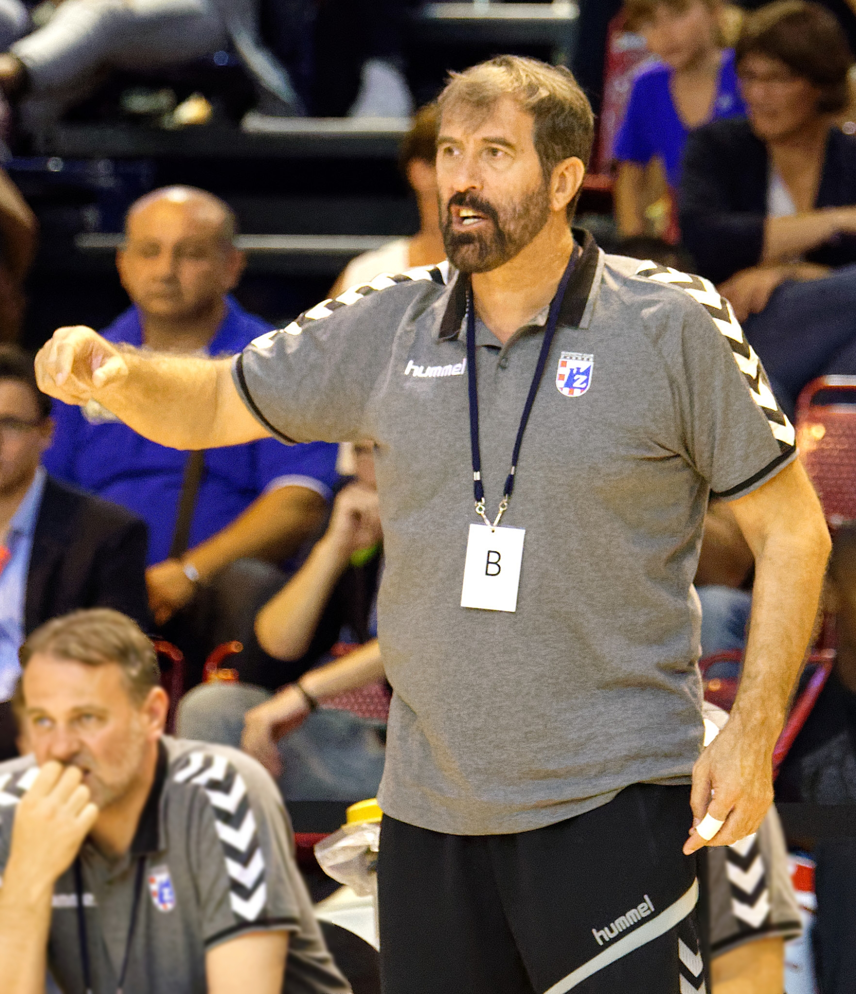 Rencontre du challenge Marrane 2016 entre l'US Dunkerque et les croates du RK Zagreb